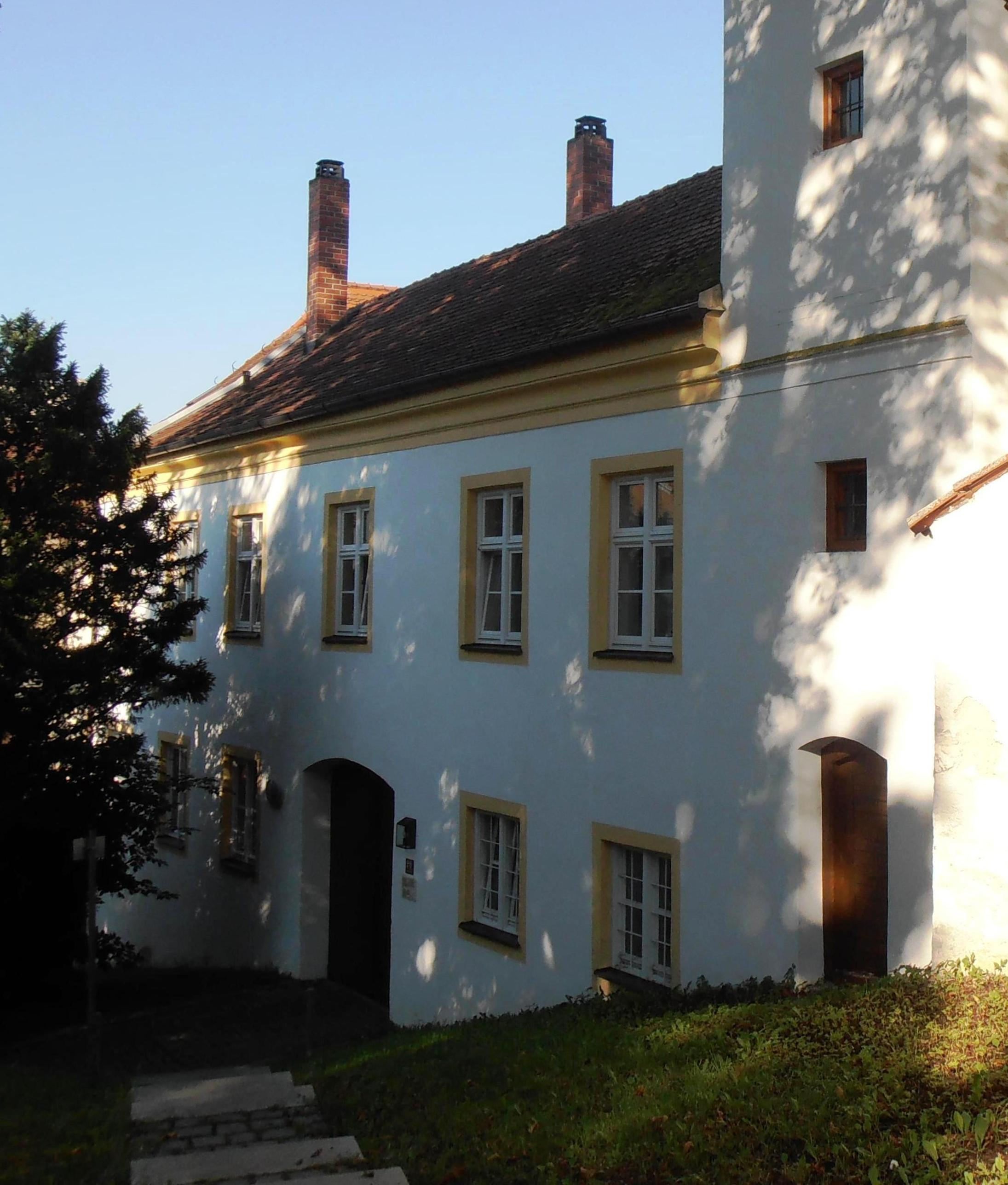 Domherrenhof Freising, Domberg 26, 1955-1959 Wohnort Joseph Ratzingers